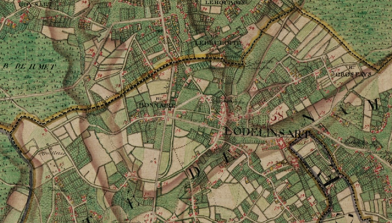 Lodelinsart (Charleroi-Belgique), vers 1775. Carte de Cabinet des Pays-Bas autrichiens La carte de Cabinet des Pays-Bas autrichiens a été levée sous la direction du comte de Ferraris entre 1770 et 1777. Il s'agit d'un document militaire réalisé en trois exemplaires et dont l'échelle originale est 1 / 11 520. La carte est entièrement manuscrite et procède de levers sur le terrain.